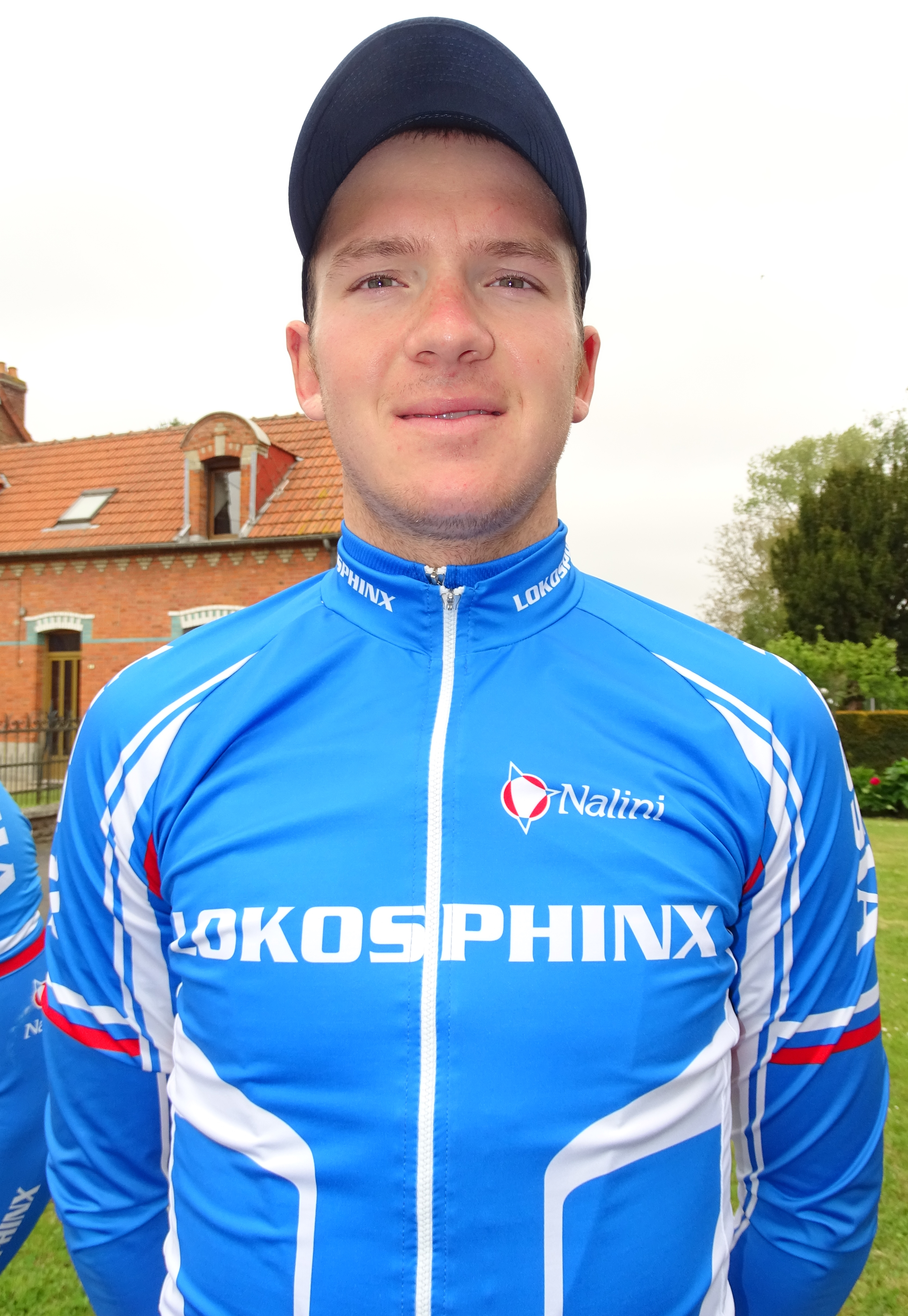 Reportage réalisé le samedi 23 mai 2015 à l'occasion du départ de la deuxième étape du Paris-Arras Tour 2015 à Ficheux, Pas-de-Calais, Nord-Pas-de-Calais, France. Depicted person: Dmitriy Sokolov Depicted team: Lokosphinx